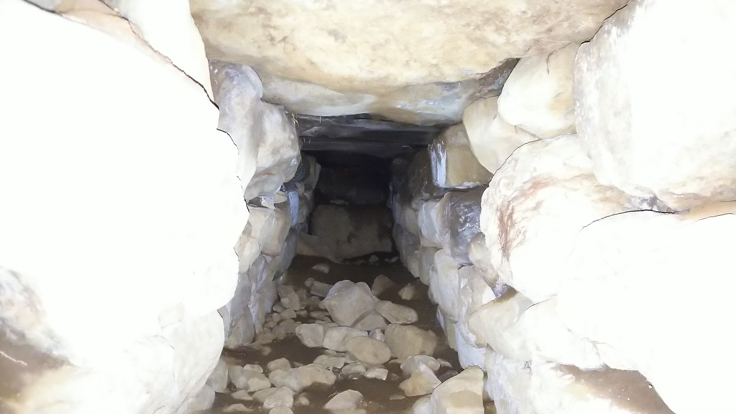 井手丸山古墳の石室内部